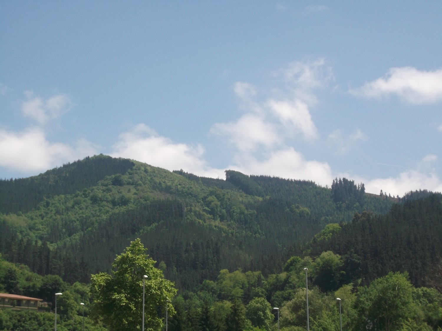 Monte mas alto de Zaldibar (673 metros)